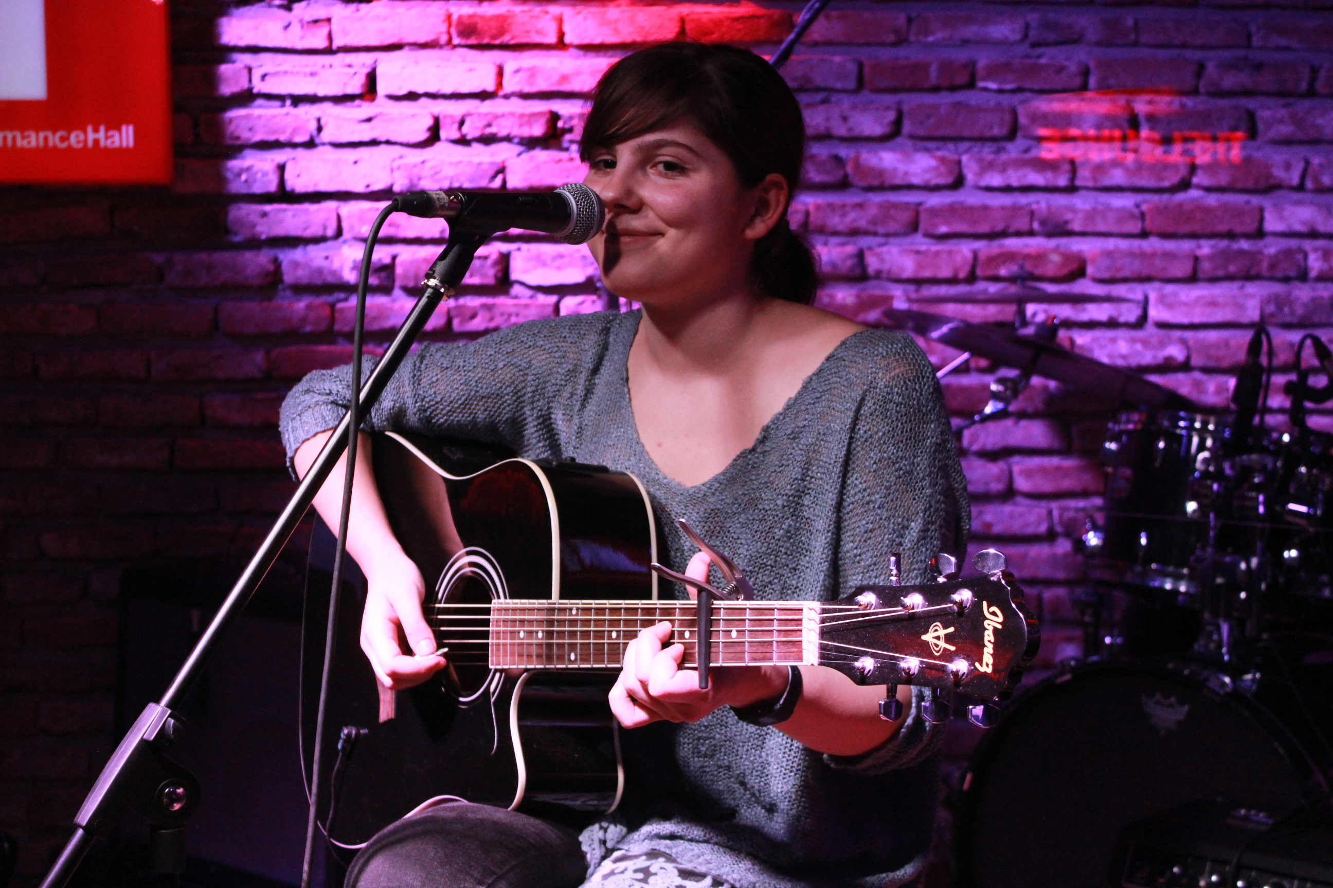 Deniz Tekin,Türk Müzisyen.